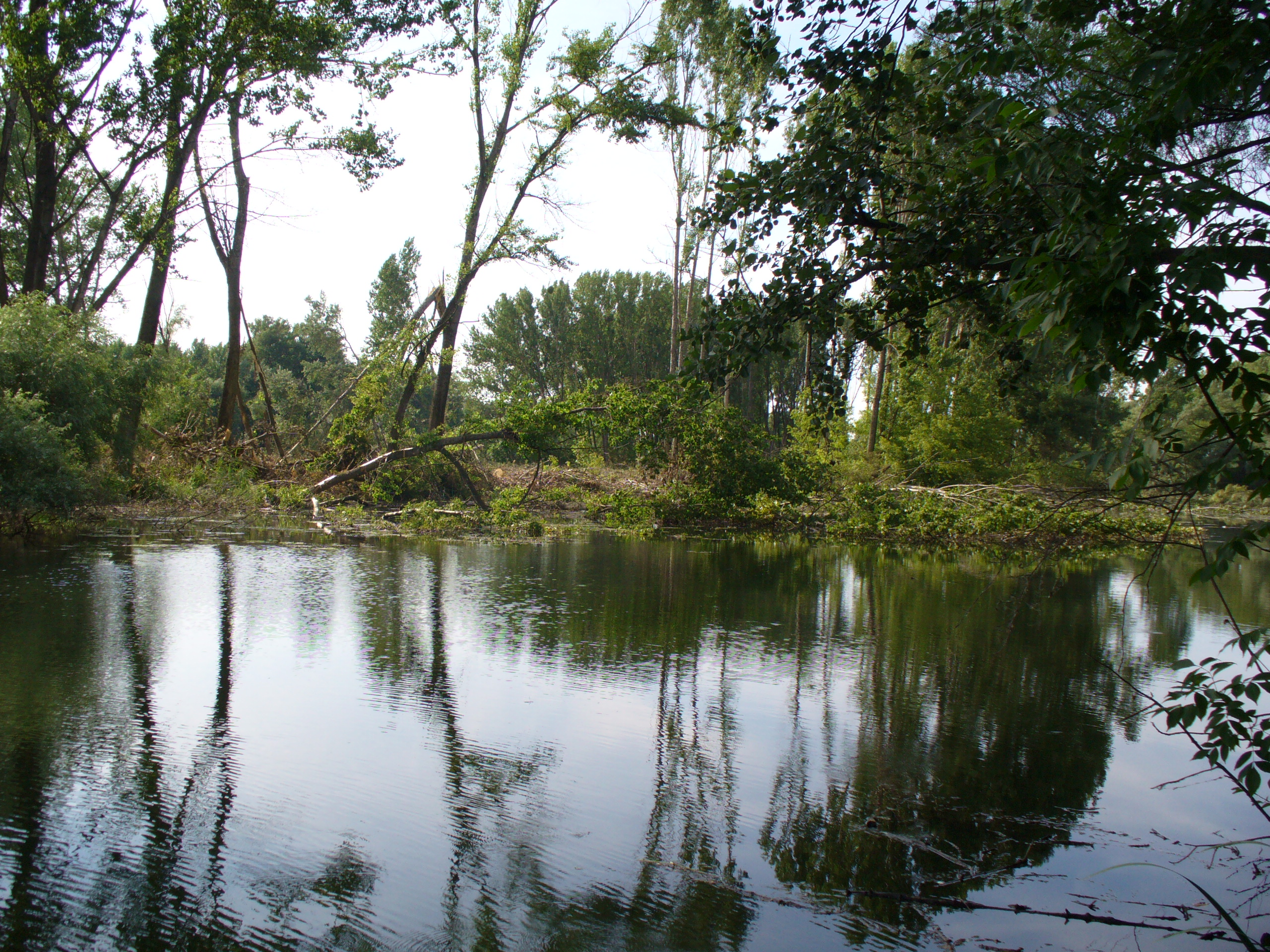 Dunajské luhy floodplains near Dobrohošť and Vojka nad Dunajom, Trnava Region, Slovakia